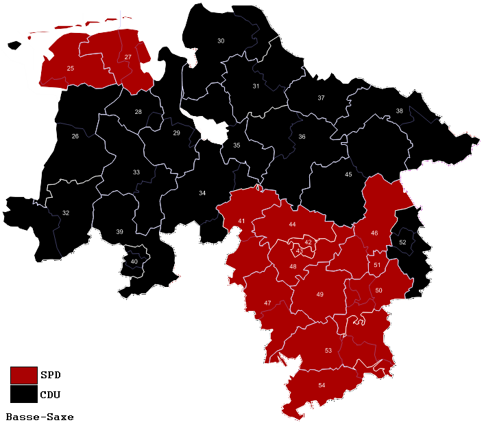 Districts de Basse-Saxe en 2009.